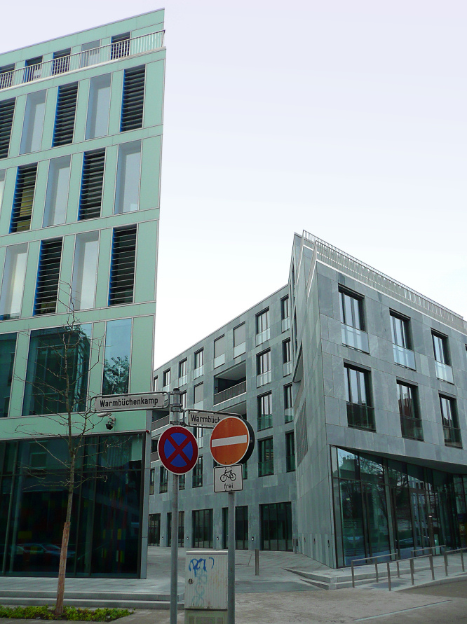 Warmbüchenkamp Hannover